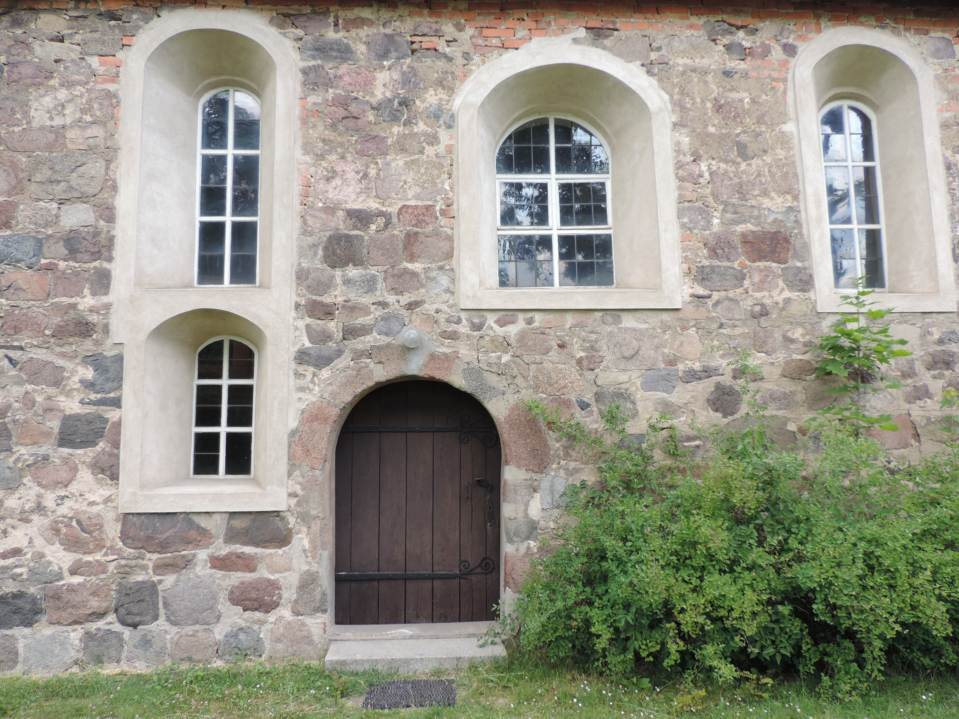 Dorfkirche Gebersdorf